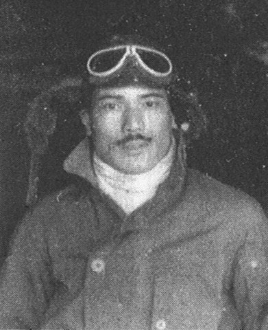 1938年南京基地で撮影された、黒岩利雄。